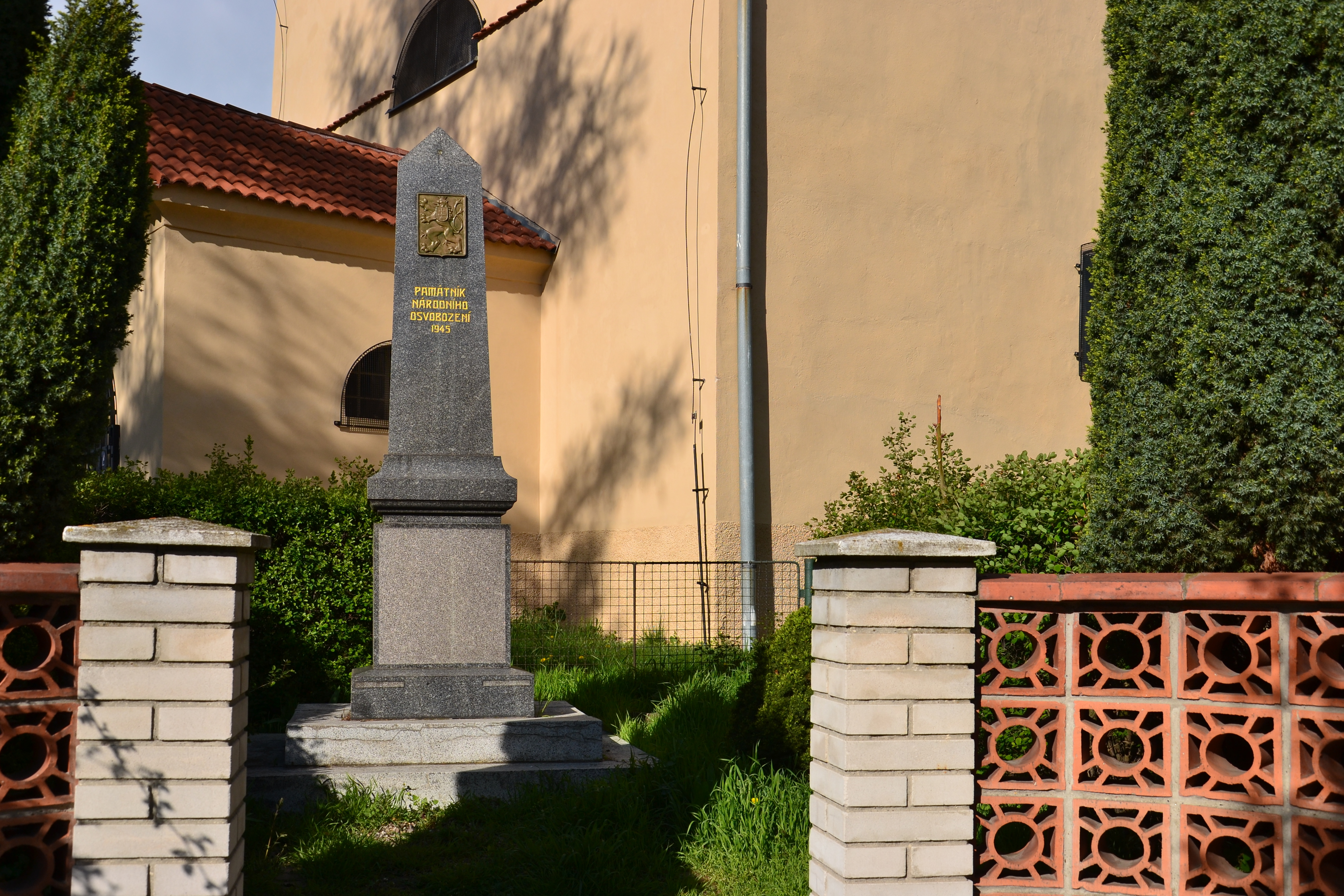 Droužkovice – pomník národního osvobození 1945